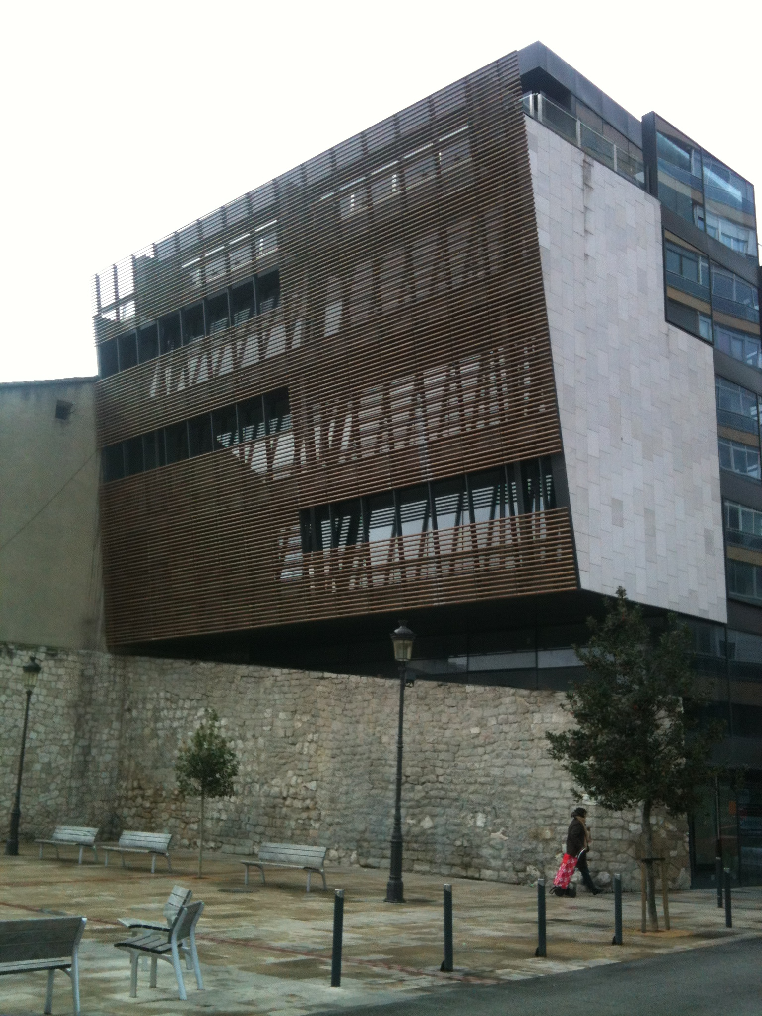 Burgos, Casa de la Muralla. Arquitecto: Albert Viaplana. Foto del 31 de enero de 2015